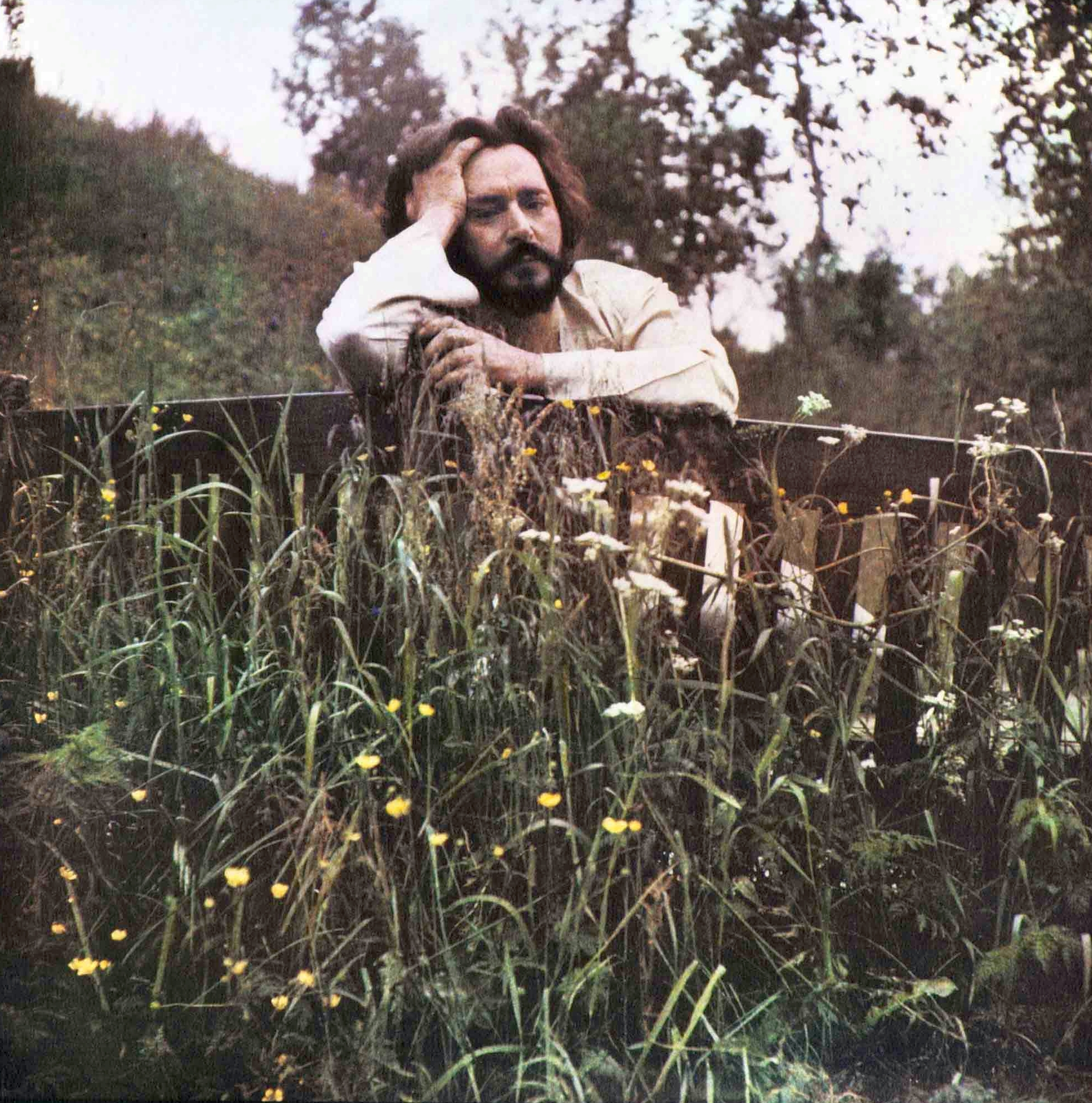 Леонид Николаевич Андреев на скамейке. Автопортрет в автохроме.